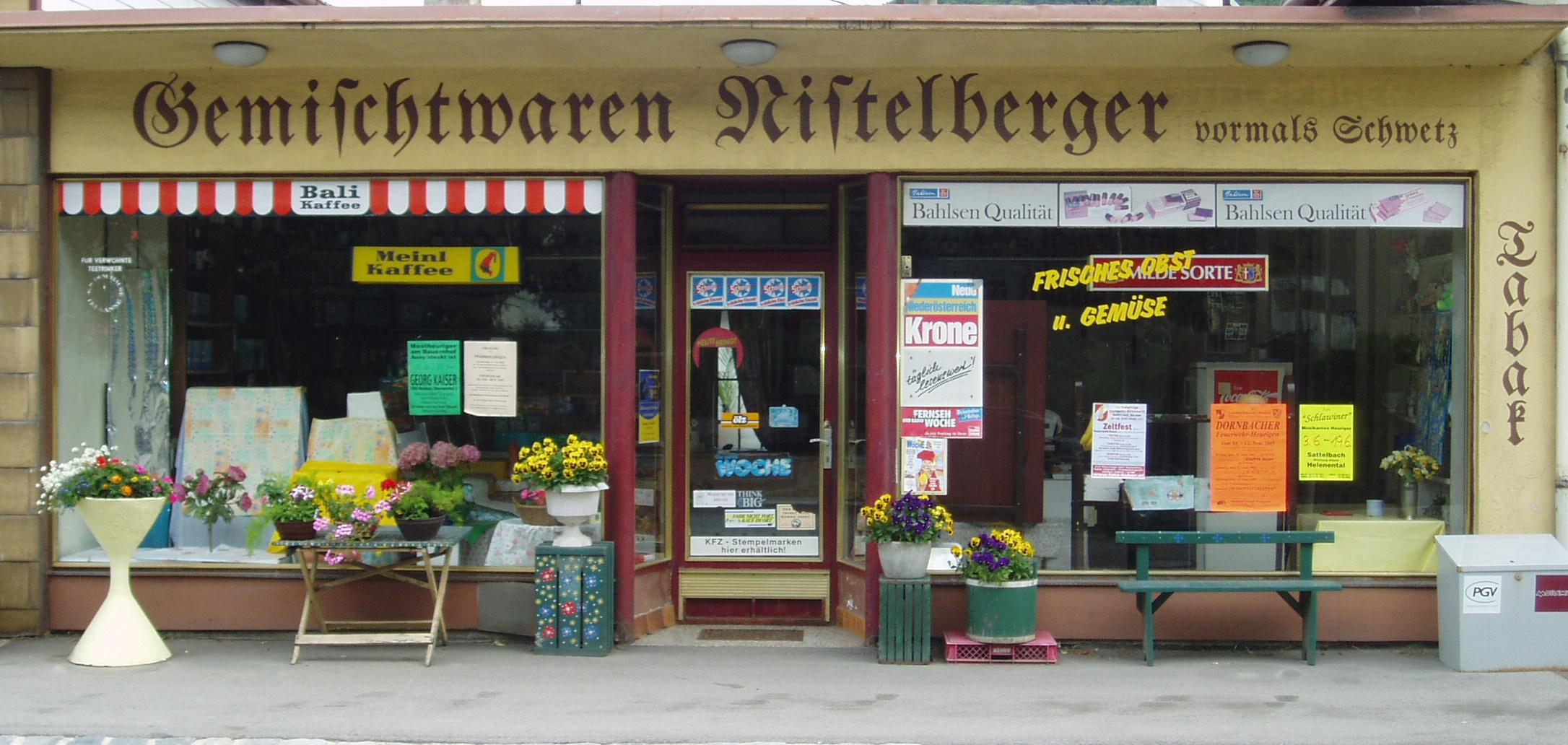 Der letzte Greissler von Alland - Ein lebendes Denkmal.